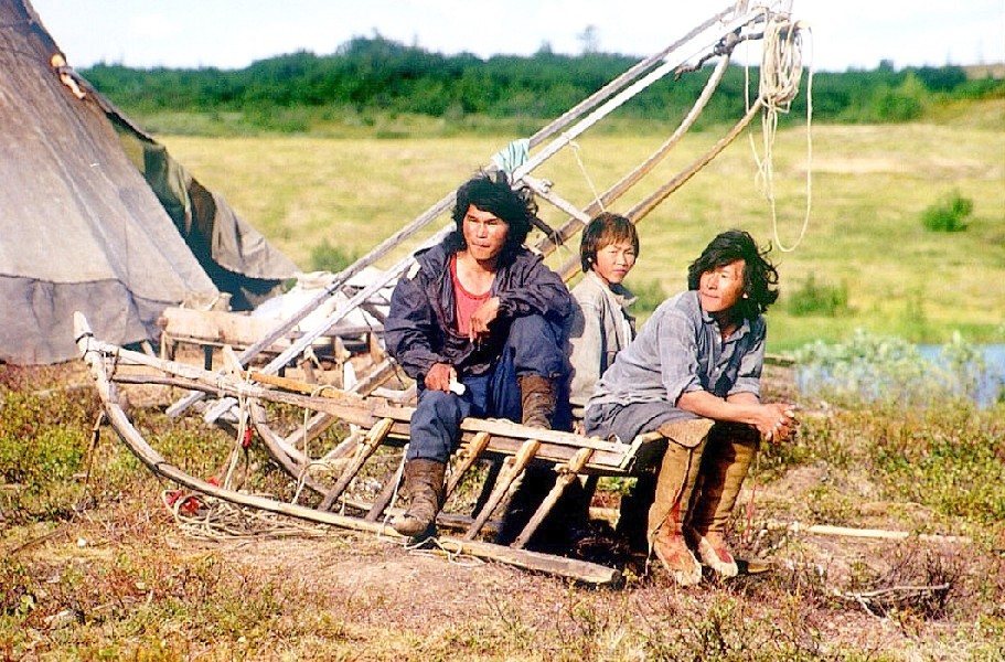 Nentzen in der Tundra bei Dudinka (69°29'N - 86°17'E) Taymyria, Krasnoyarsk kray, Russland